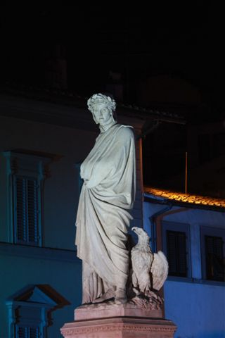 Statua dedicata a Dante (1865).